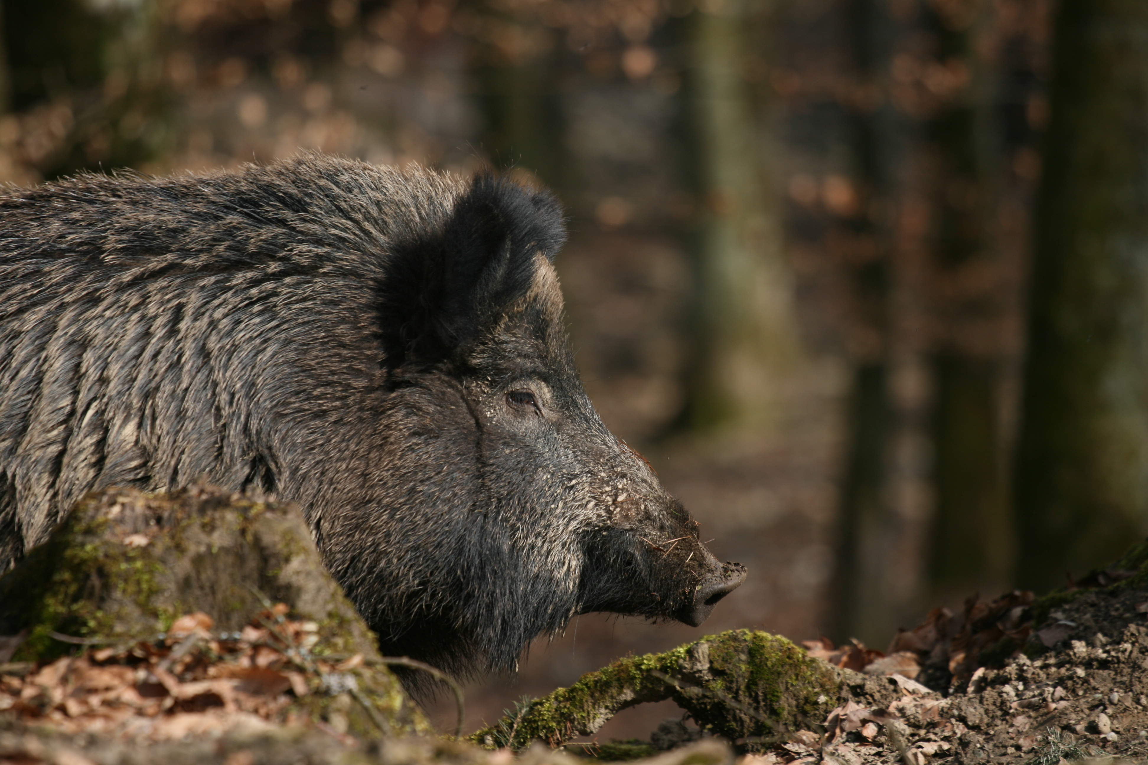 Ausgewachsenes Wildschwein im Winterfell.